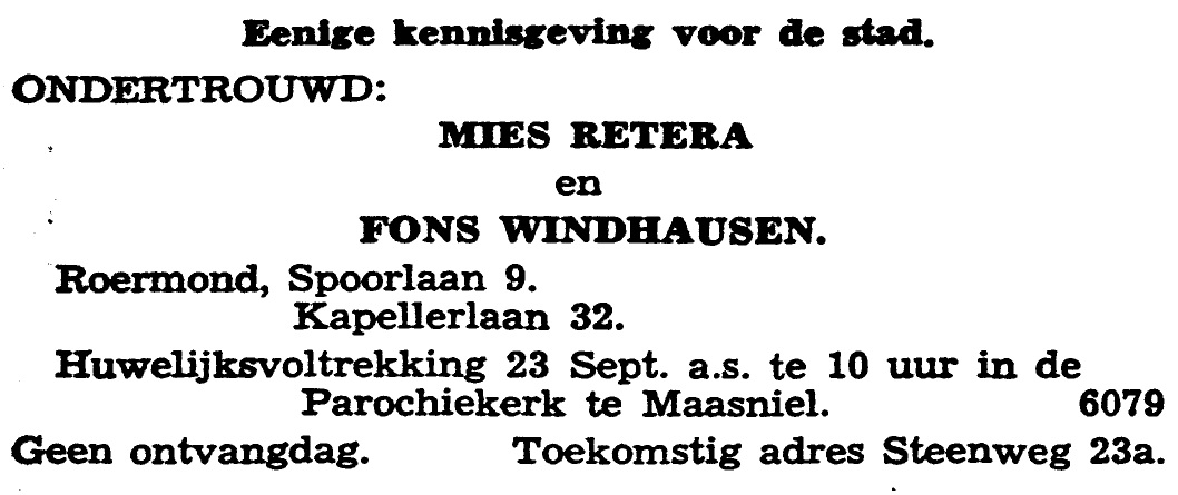 Huwelijksadvertentie. Uit De Nieuwe Koerier, zaterdag 5 september 1936, Eerste Blad, [p. 4].